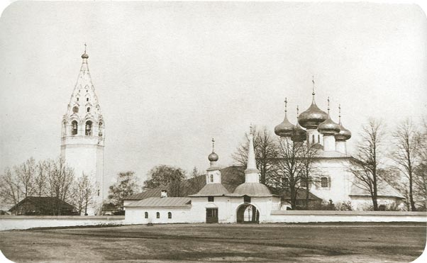 Собор Рождества Богородицы в Устюжне. Дореволюционная фотография